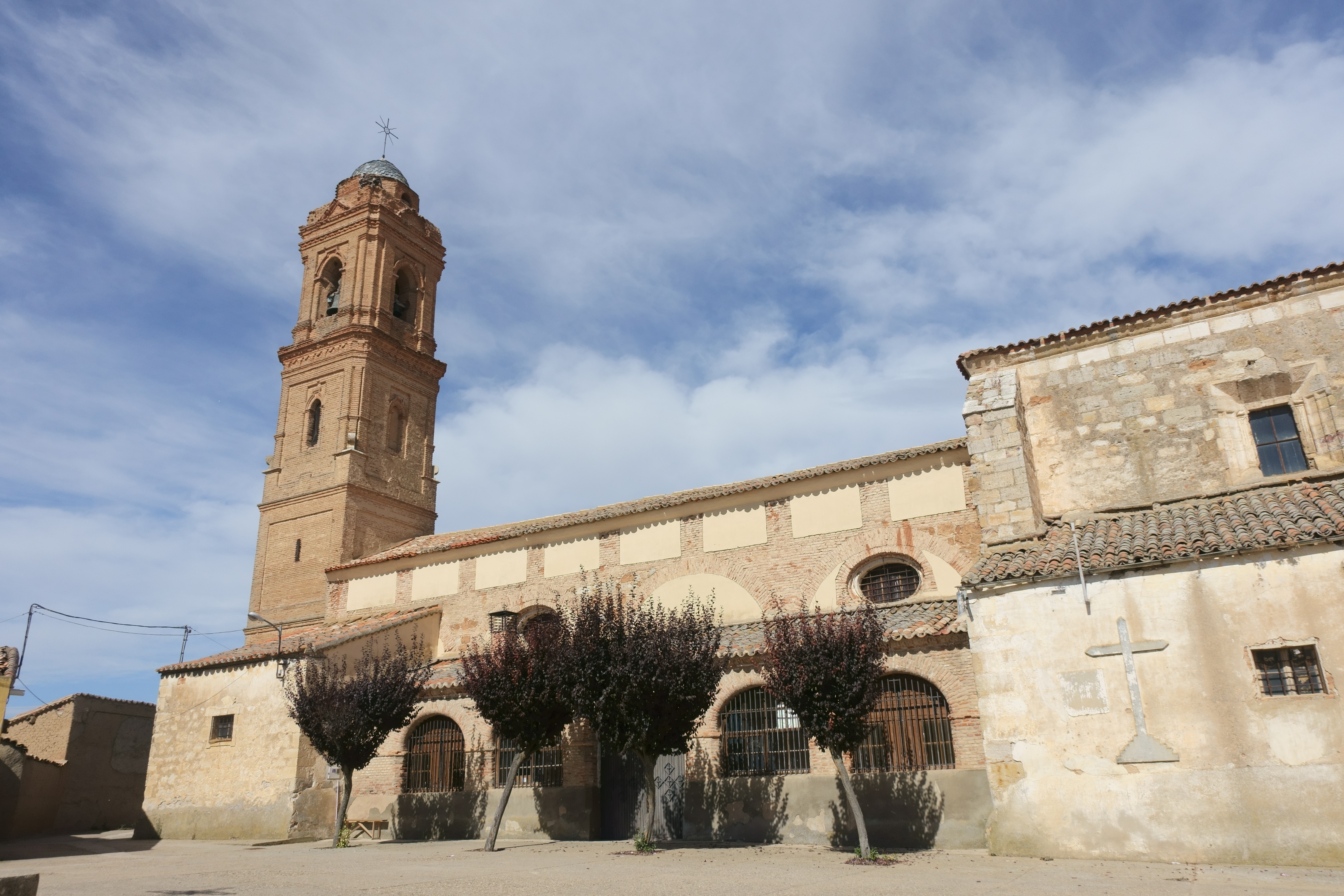 Iglesia de la Asunción, Castronuevo (Zamora, España).